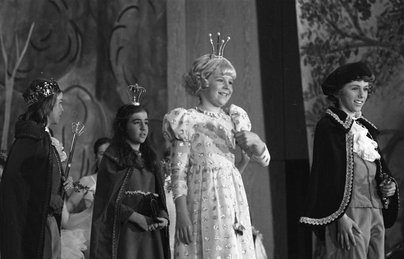 Bonner Kindertheater "Dornröschen" in der Aula des Ernst-Moritz-Arndt-Gymnasiums (Mitte: Cornelia Scheel)